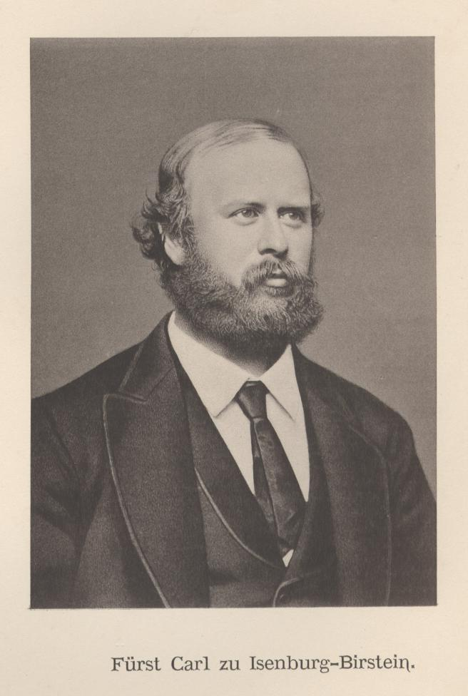 Fürst Karl zu Isenburg-Birstein (1838-1899), katholischer Aktivist im Kulturkampf